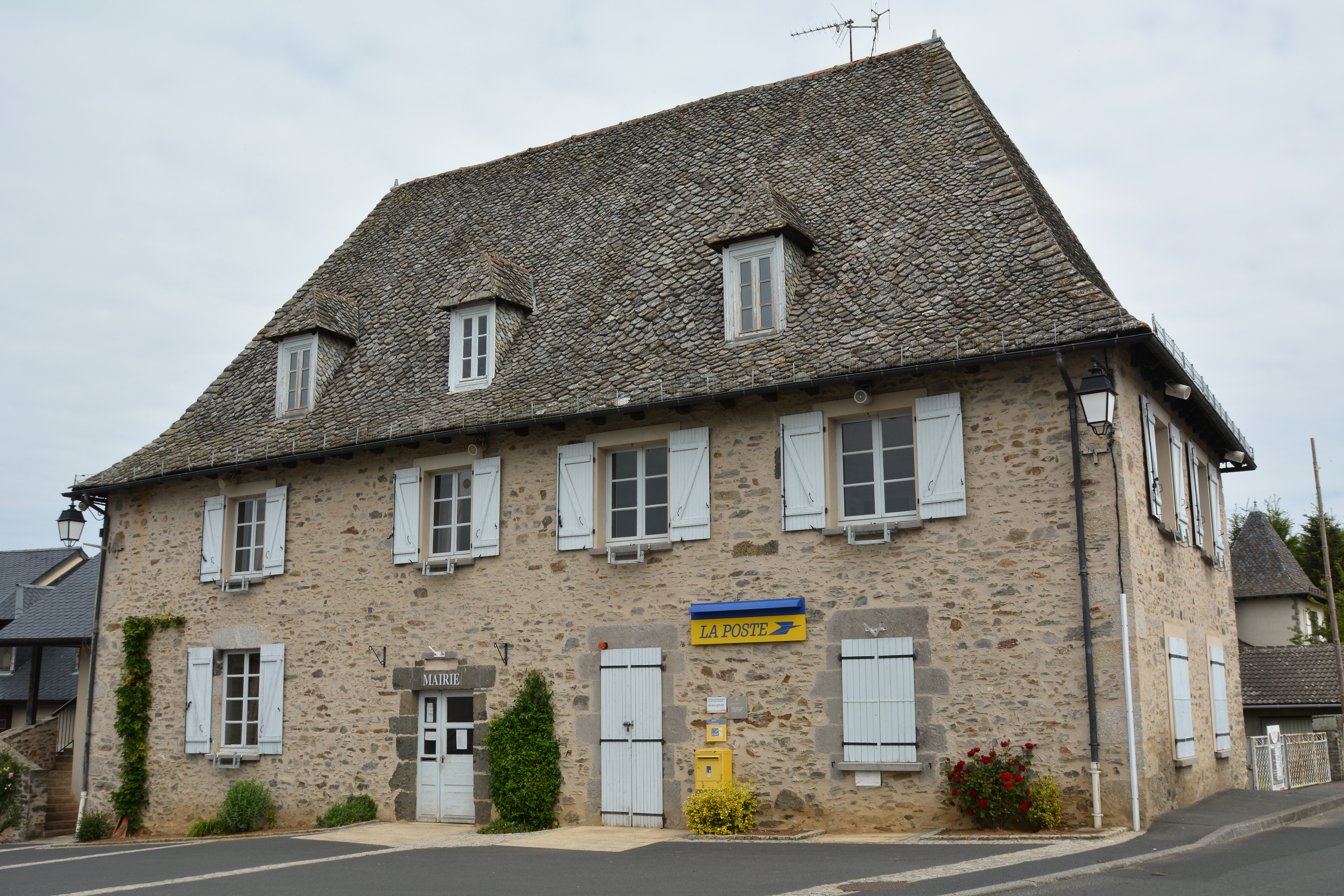 Mairie de Roannes-Saint-Mary